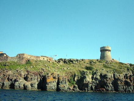 Capraia